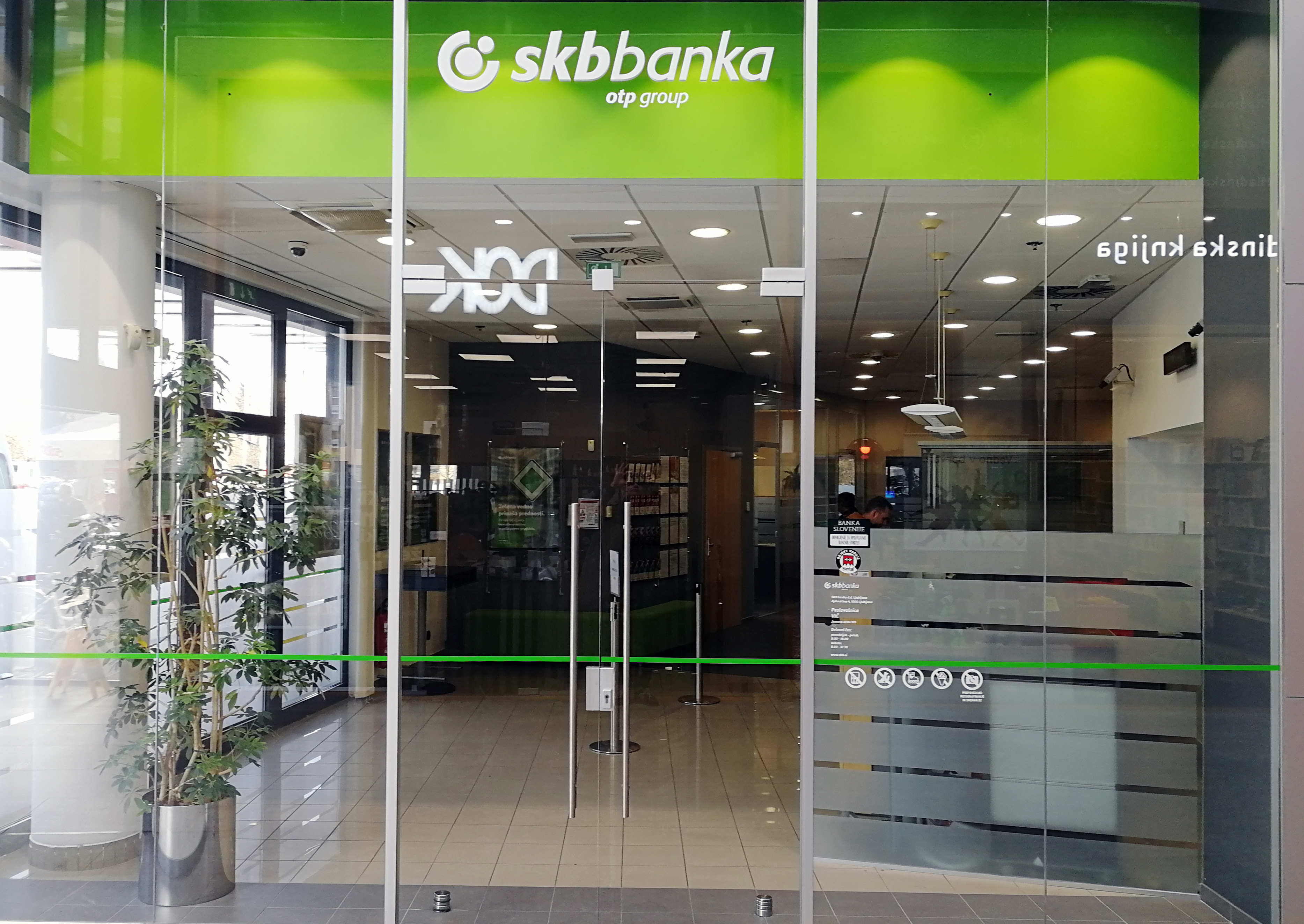 Poslovalnica SKB banke